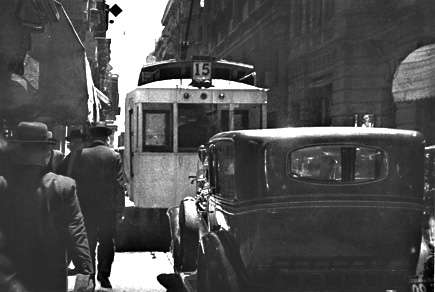 Un tranvía de la línea 15 circula por la calle San Martín.